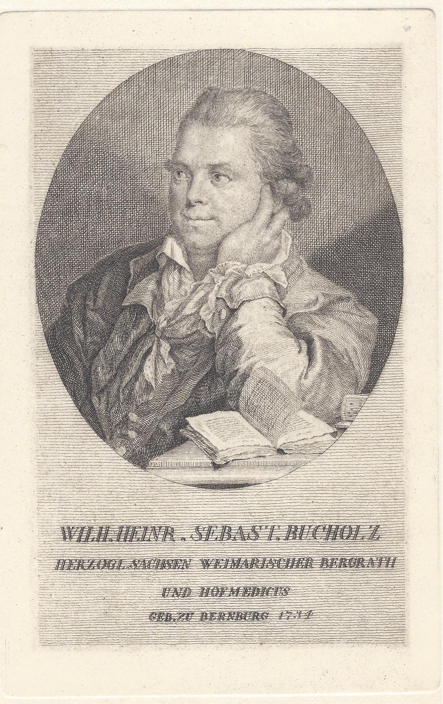 Wilhelm Heinrich Sebastian Buchholz, herzoglich sächsisch-weimarischer Bergrat und Hofarzt, Frontispiz zur Allgemeinen deutsche Bibliothek, 1791, Berlin, bei Friedrich Nicolai Literatur: Mortzfeld A 2995